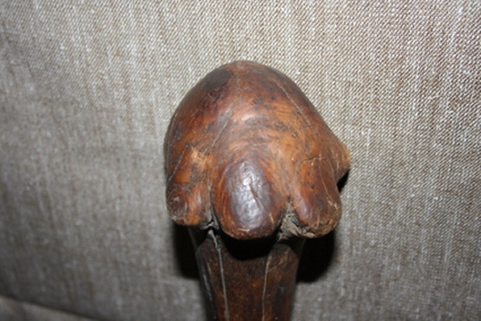 Tête de massue kanak war club